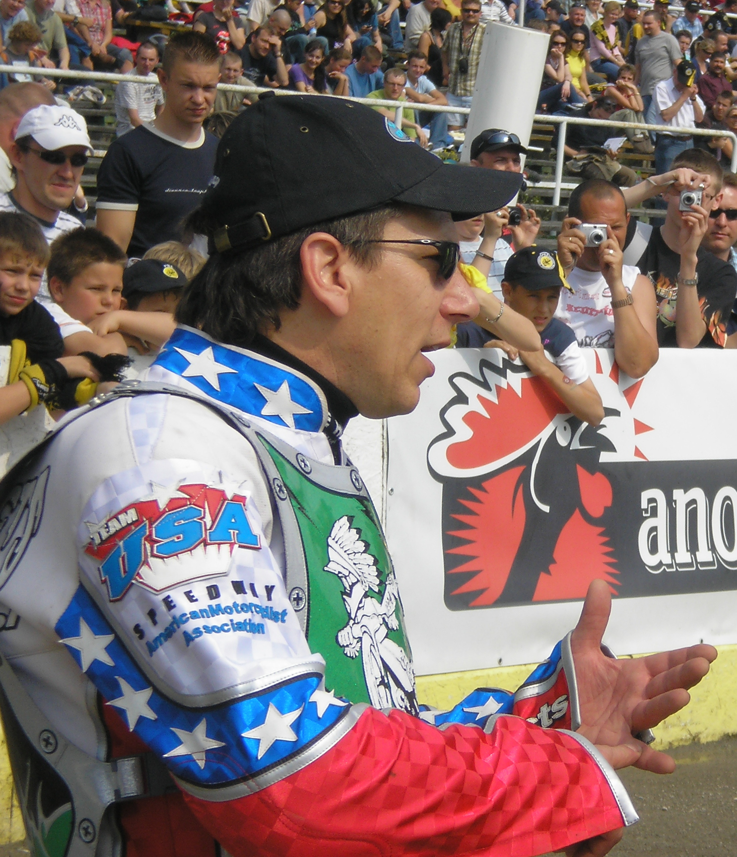 Sam Ermolenko - Turniej z okazji 15-lecia startów Adama Skórnickiego.